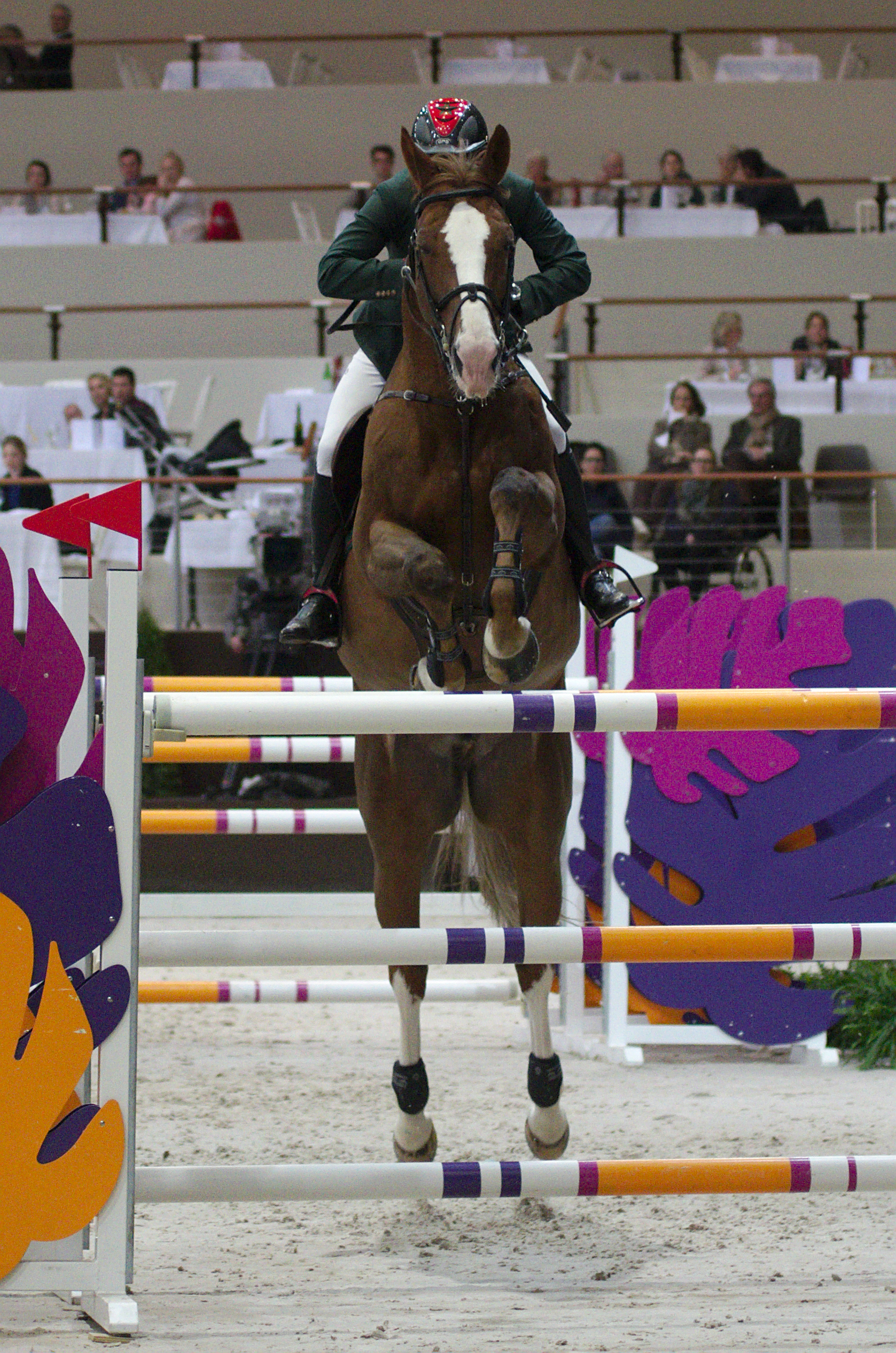 54eme CHI de Genève - 20141213 - Coupe de Genève - Abdelkebir Ouaddar et Quebec Tame